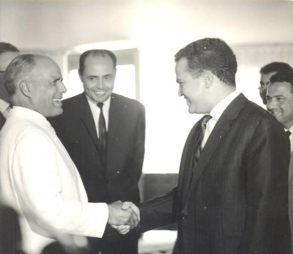 Mohamed Sayah saluant le président Bourguiba